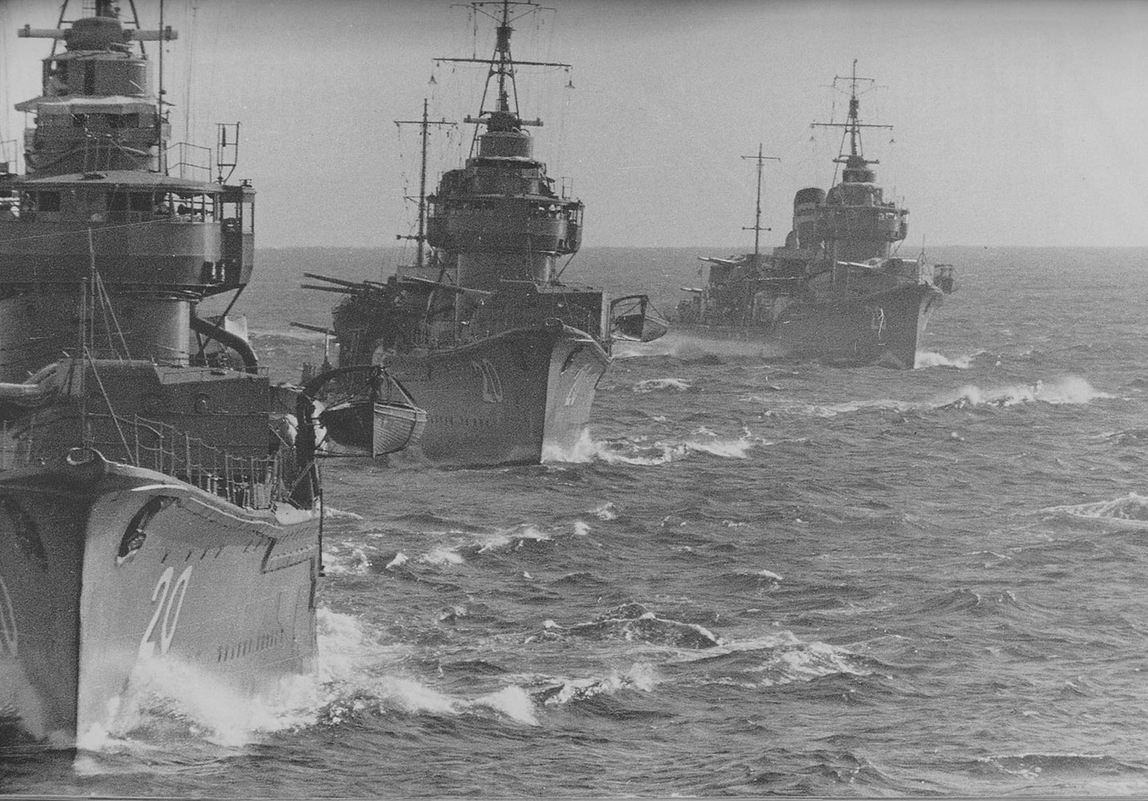 Эскадренные миноносцы «Сагири», «Амагири» и «Асагири» типа «Фубуки» второй серии на учениях. Снимок сделан с «Югири» 16 октября 1941 года.